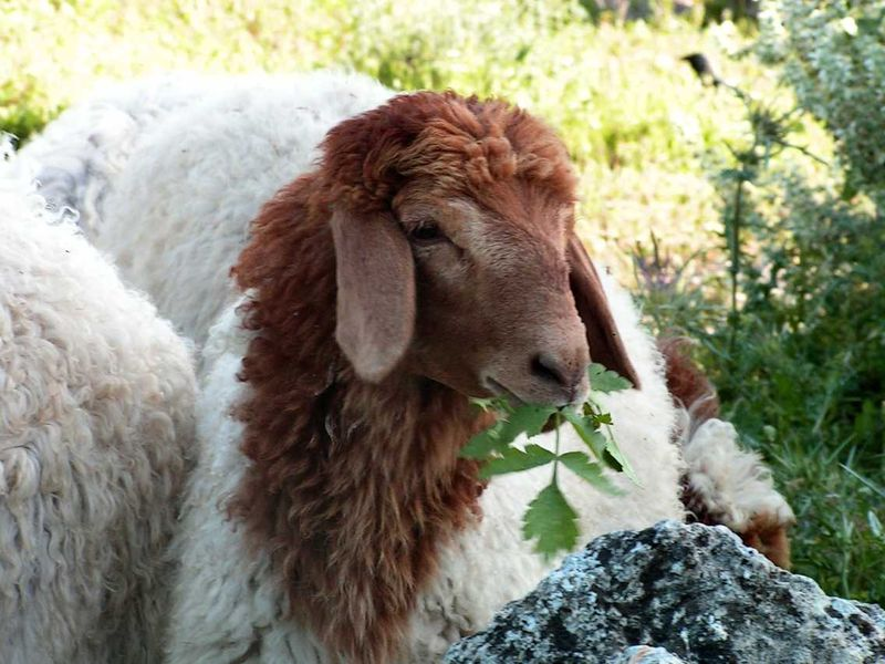 כבשה אוכלת צמחים בעמק האלה צולם על ידי יואב רוזנברג, ירושלים